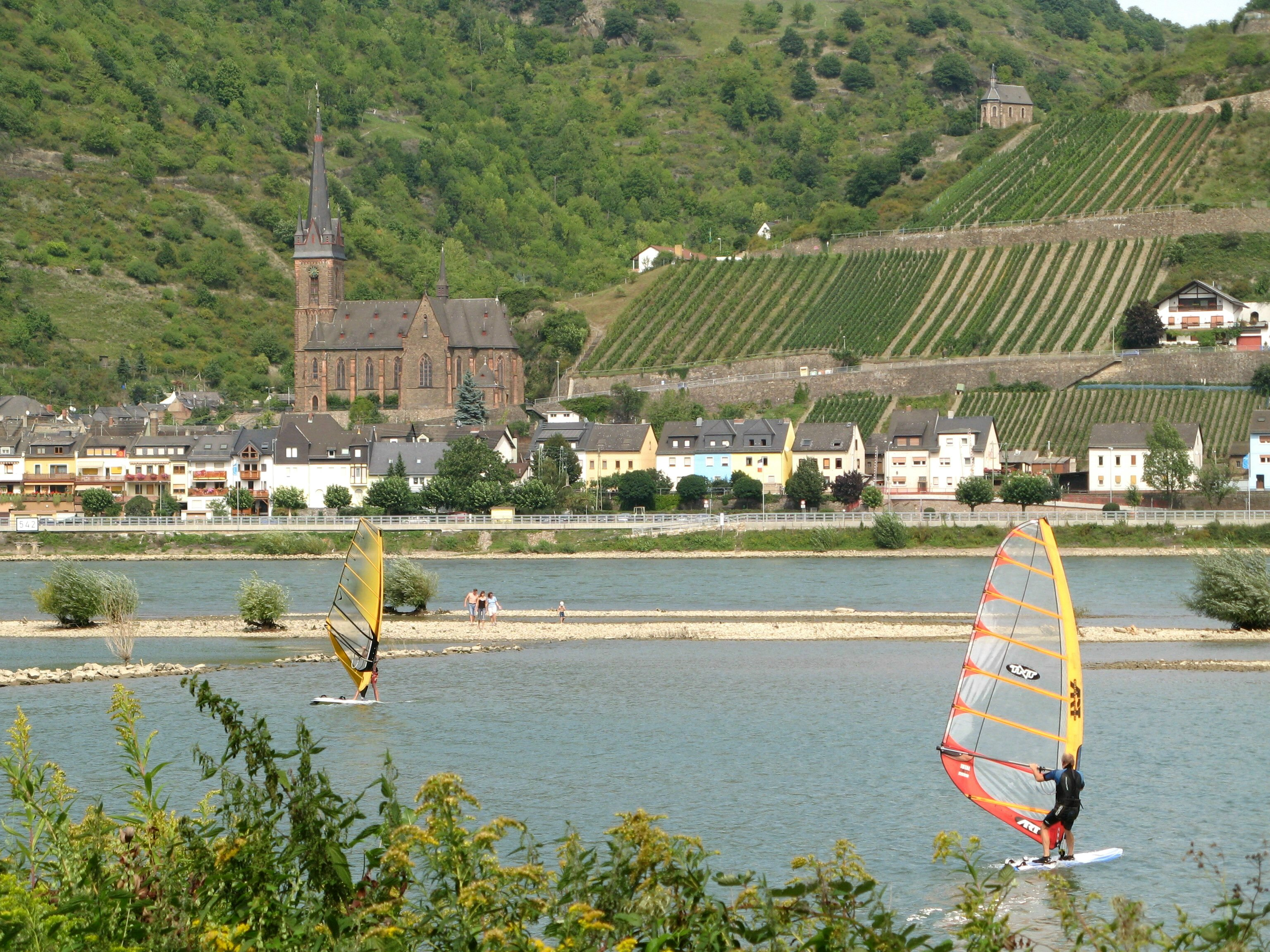 Lorchhausen im Rheingau